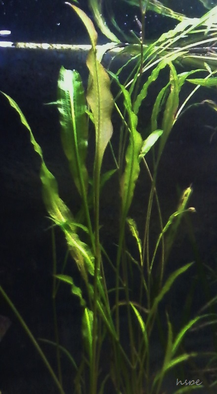 Tomuto rdestu se dobře daří v tropických akváriích